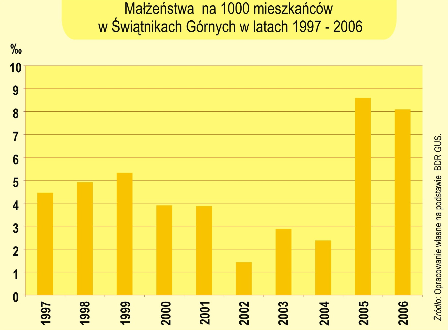 Małżeństwa - Świątniki Górne